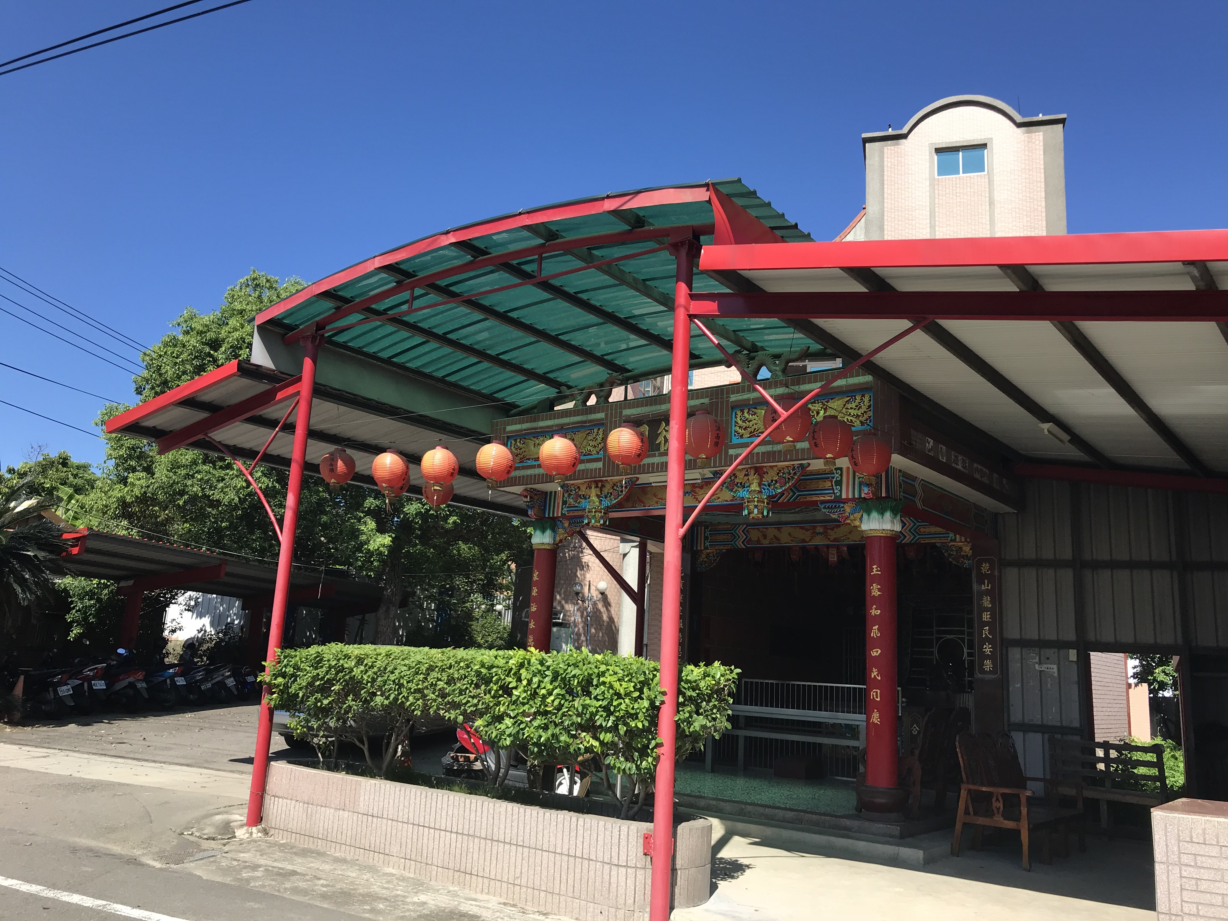 中文（台灣）: 玉泉村開基福德祠一景